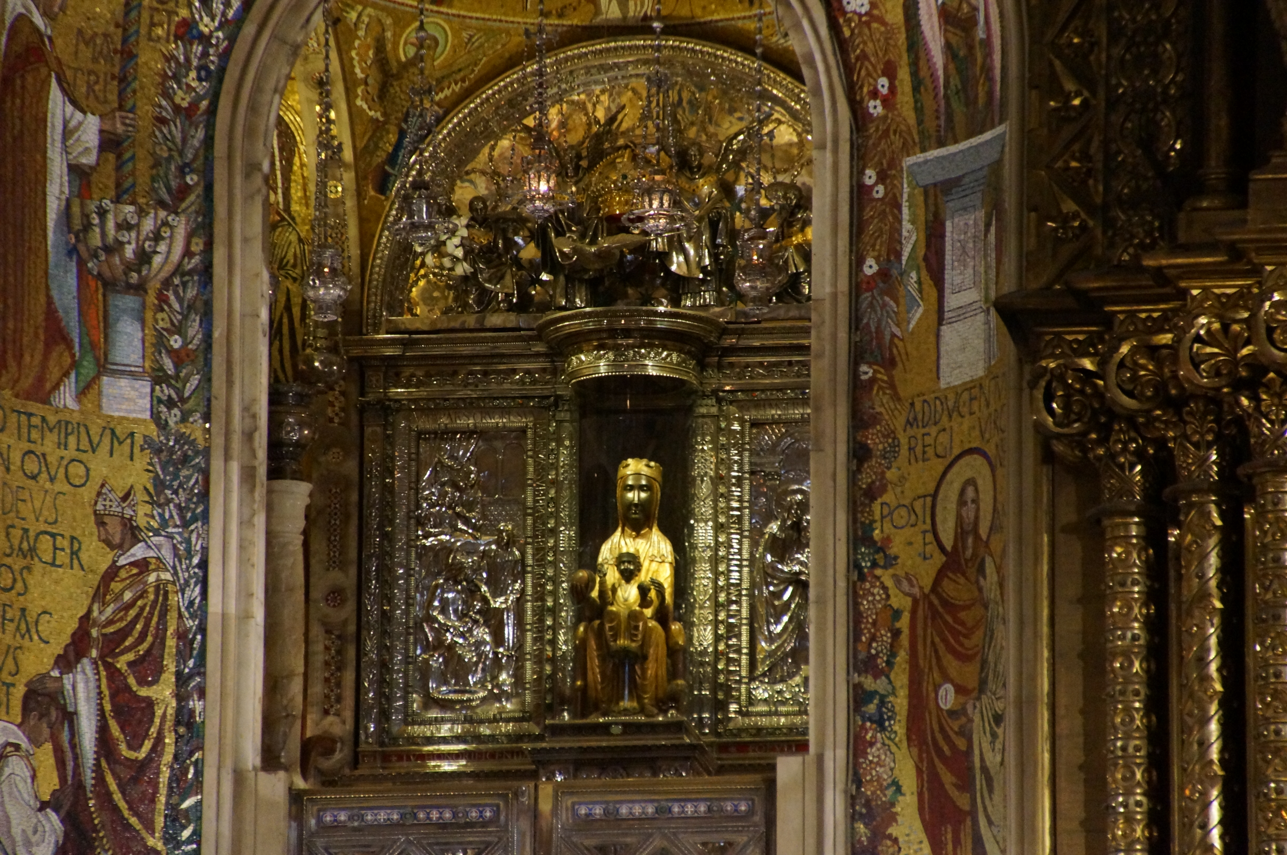 Monestir de Santa Maria de Montserrat (Monistrol de Montserrat)